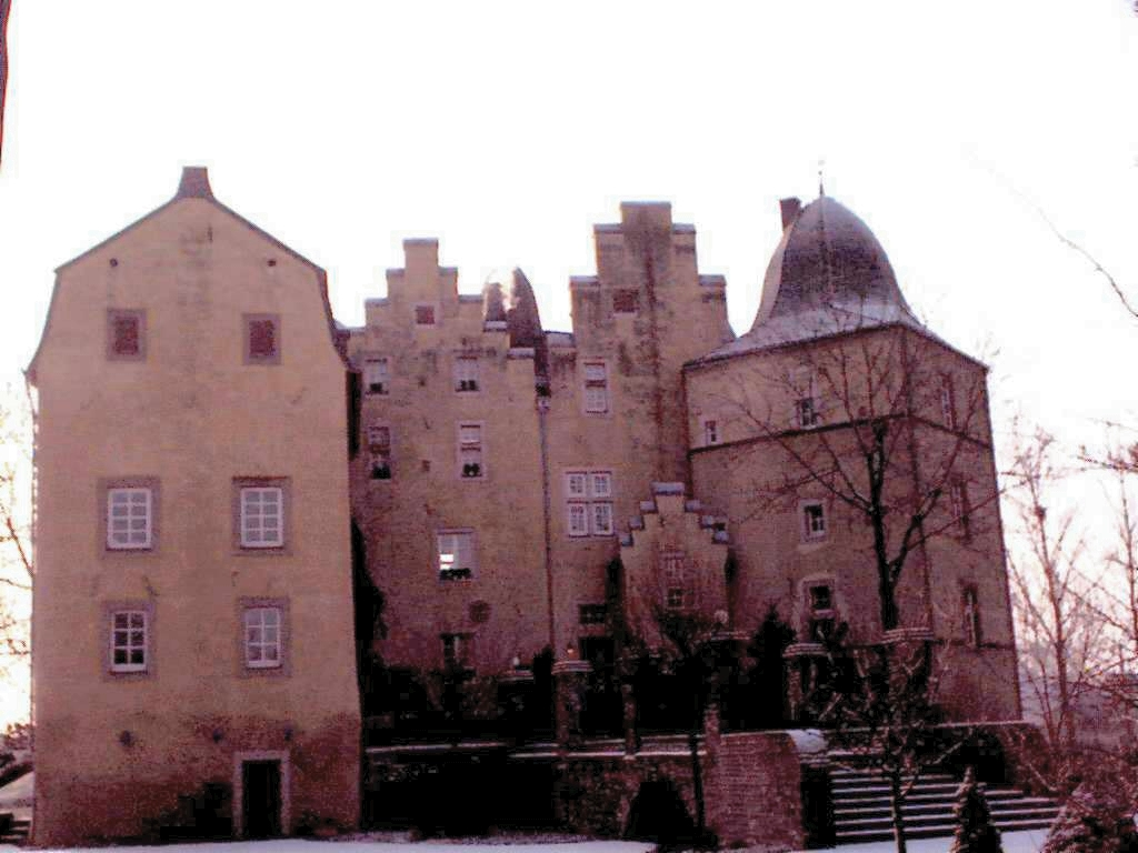 Burg Bodenheim Nordseite / Bodenheim Castle North Front